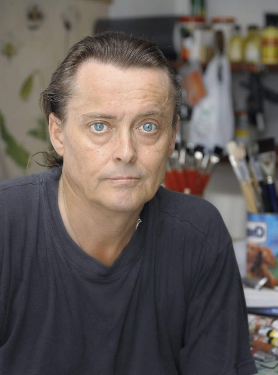 Portrét Martina Pawery - akademického malíře